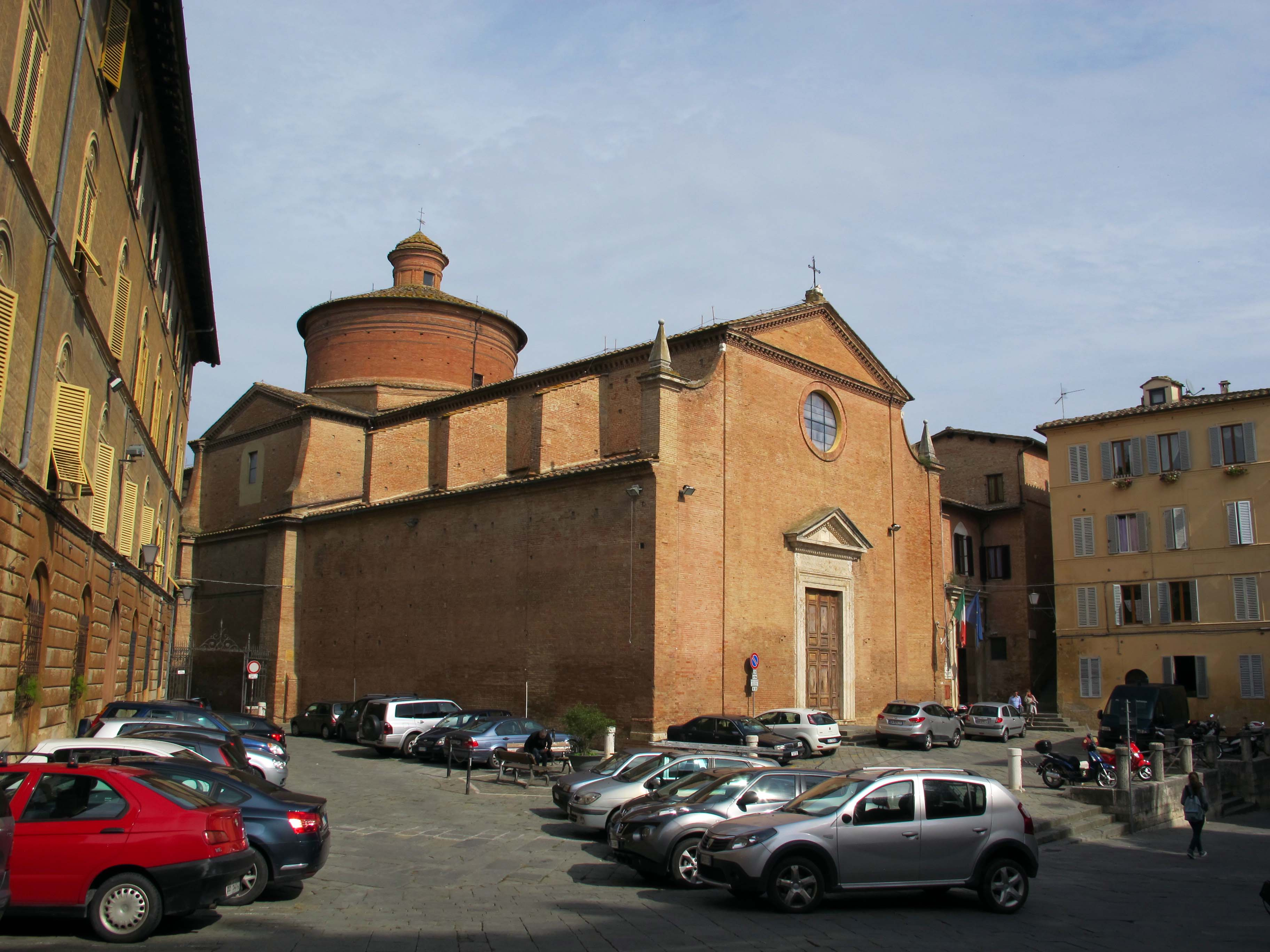 Siena